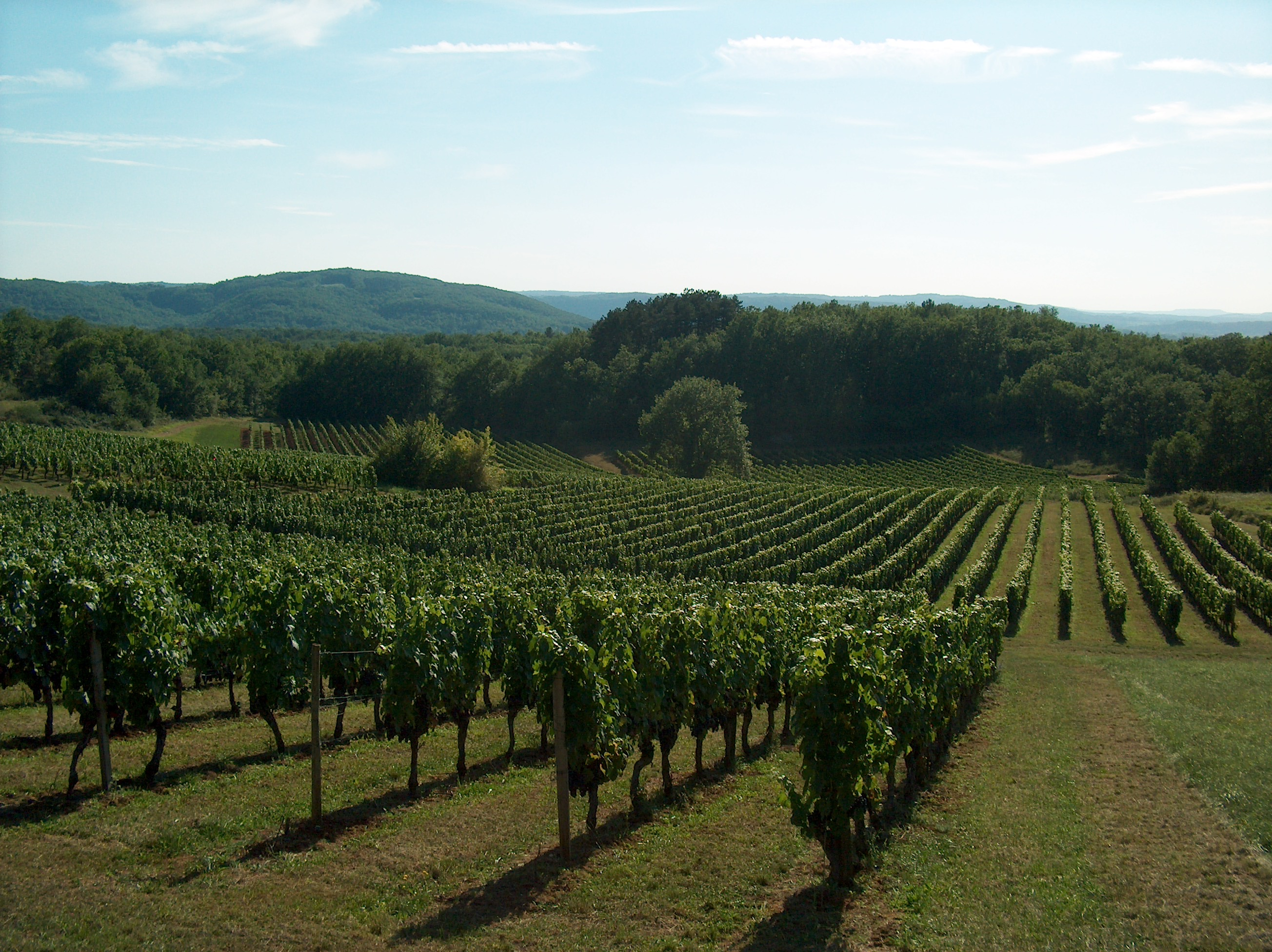 Dans le vignoble de Cahors sur la commune de Luzech, rive droite de la vallée du Lot sur les hauteurs de Luzech quartier FAGES.